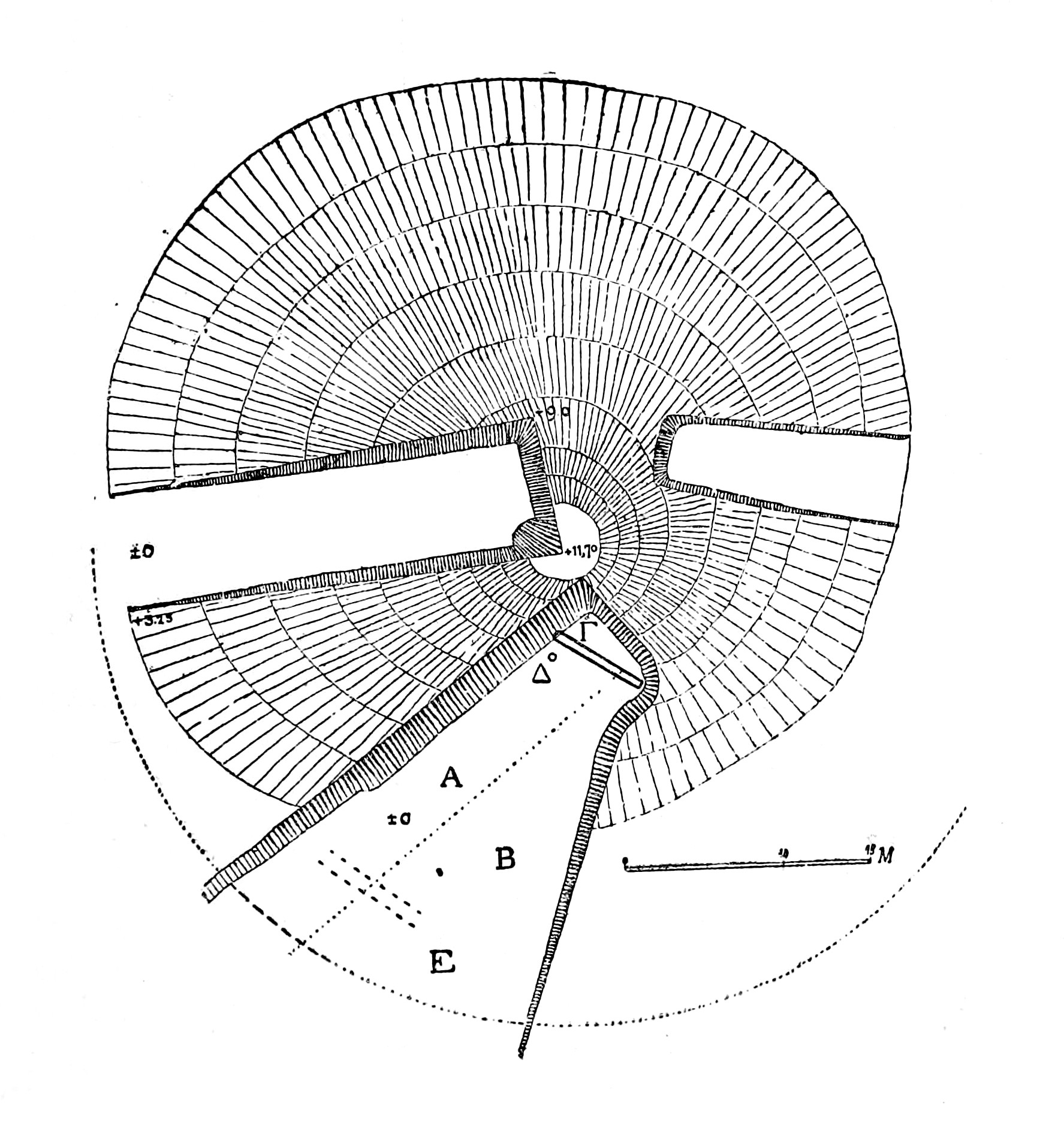 Mappa degli scavi di Valerios Stais al Soros di Maratona.